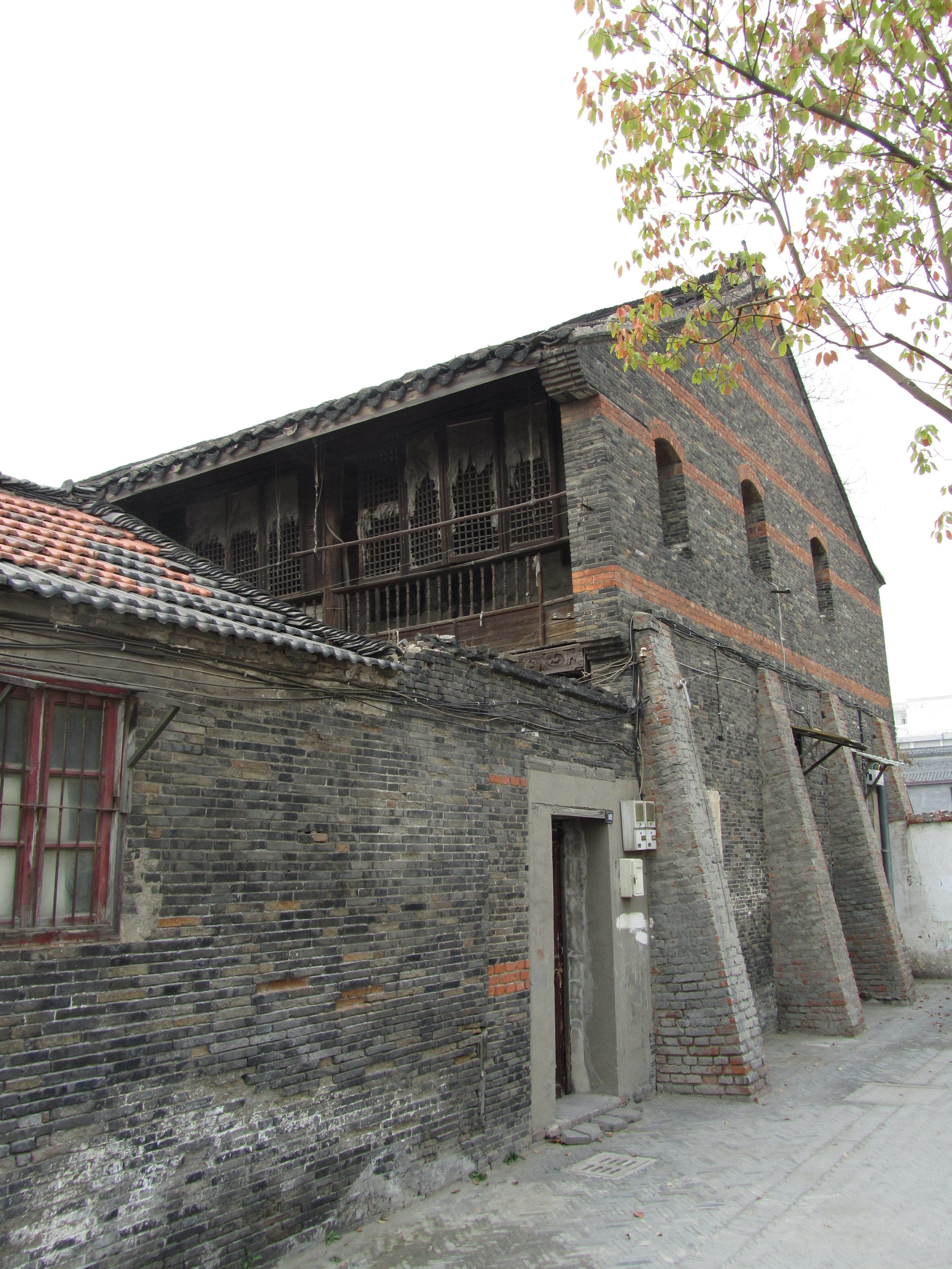 扬州广陵区皮市街147-149号扬州教案旧址。